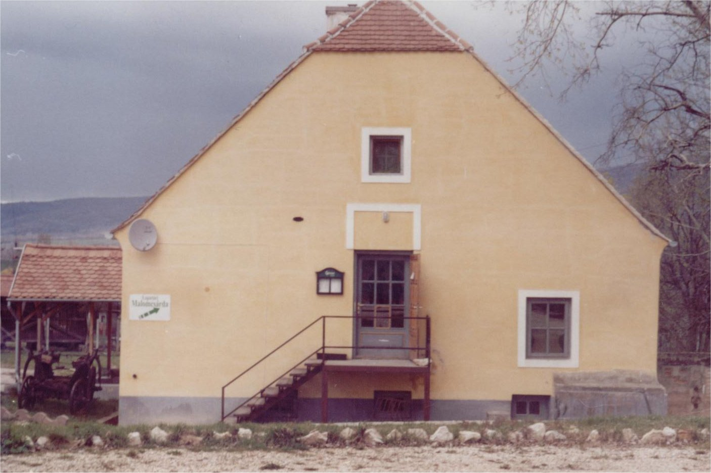 Lapatári malom. tervező: Fellner Jakab (1753). azonosító 6478 (törzsszám 2286). -Bánhida, Kertváros, Alkotmány utca